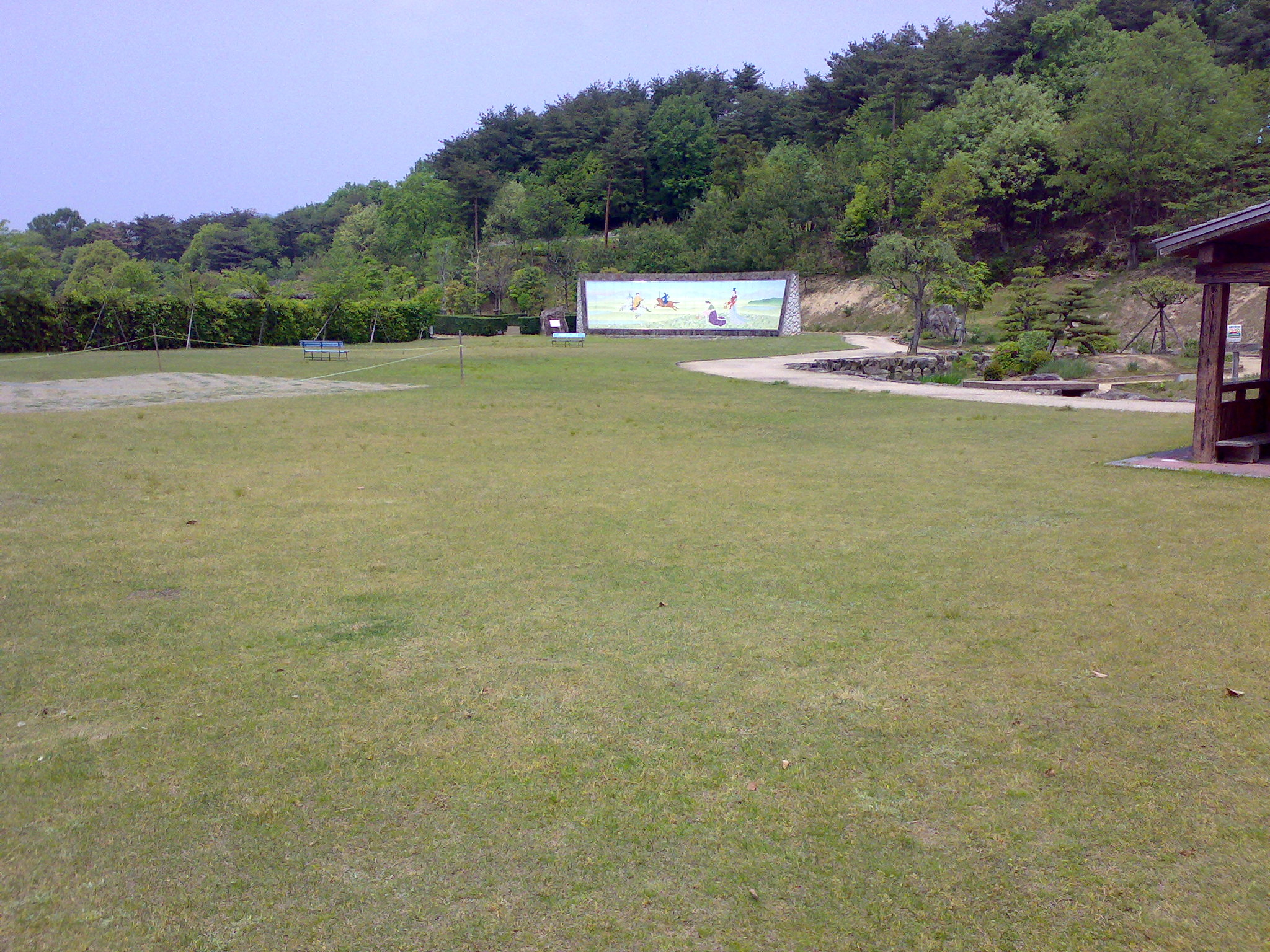 近江蒲生野 船岡山